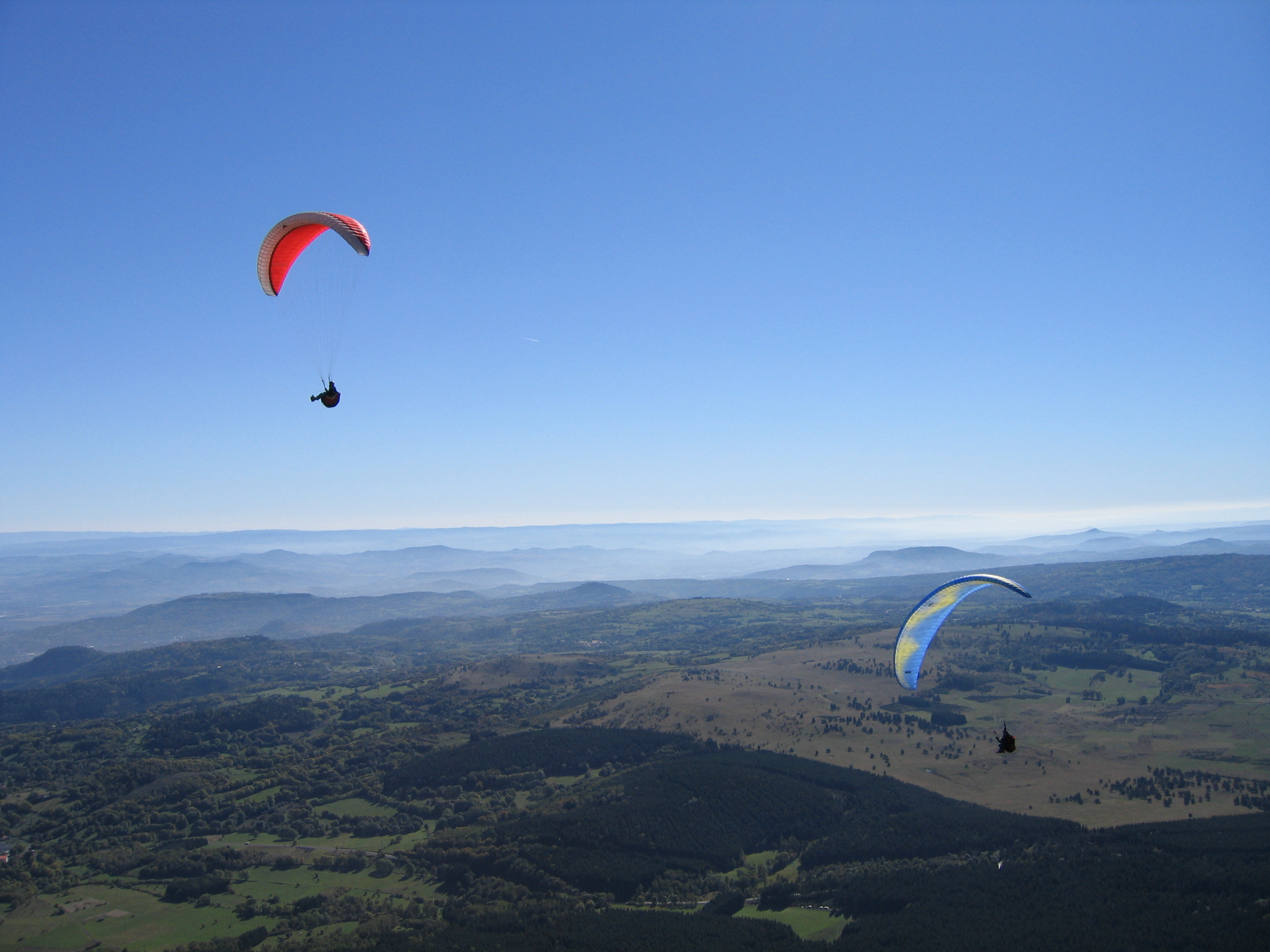 Vue du Puy-de-Dôme (département du Puy-de-Dôme, région Auvergne)